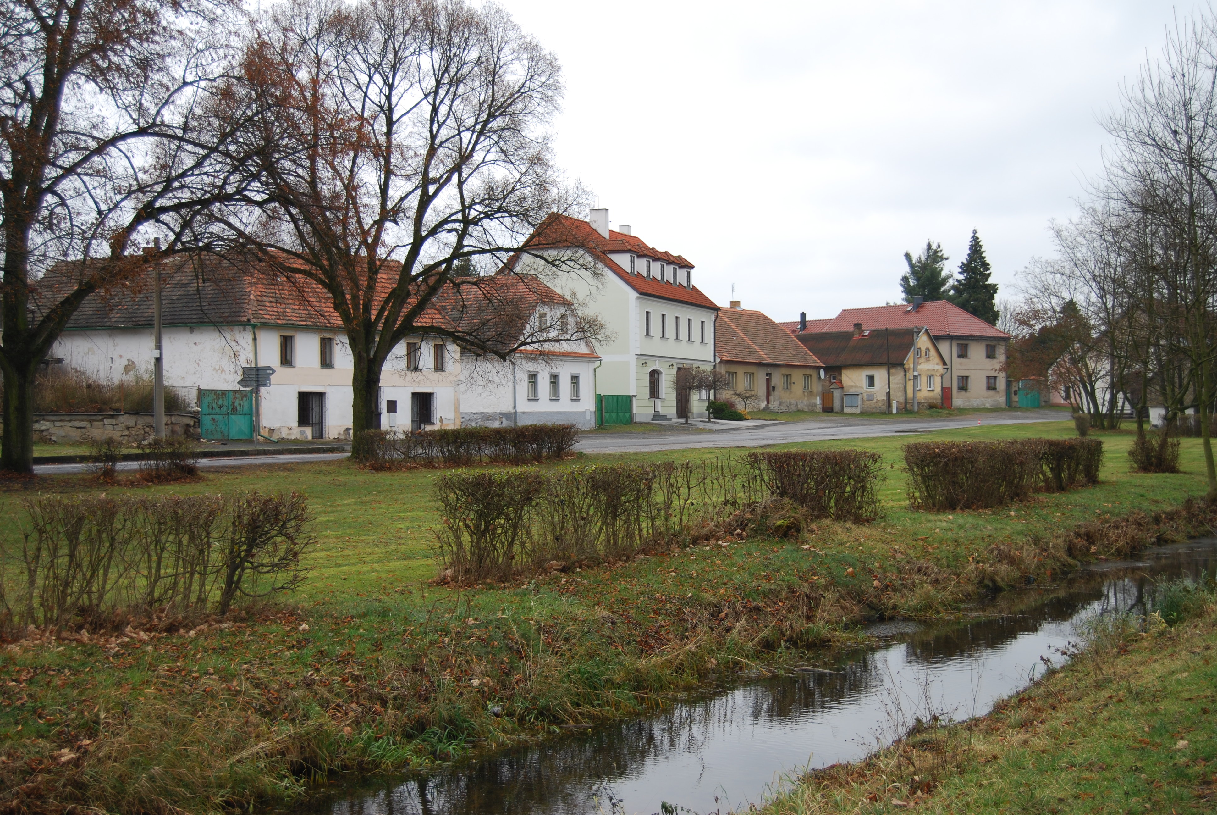 Pohled na náves od zámku. Obec Tochovice se nachází v okrese Příbram, kraj Středočeský. Česká republika. - Google Maps - Google Earth